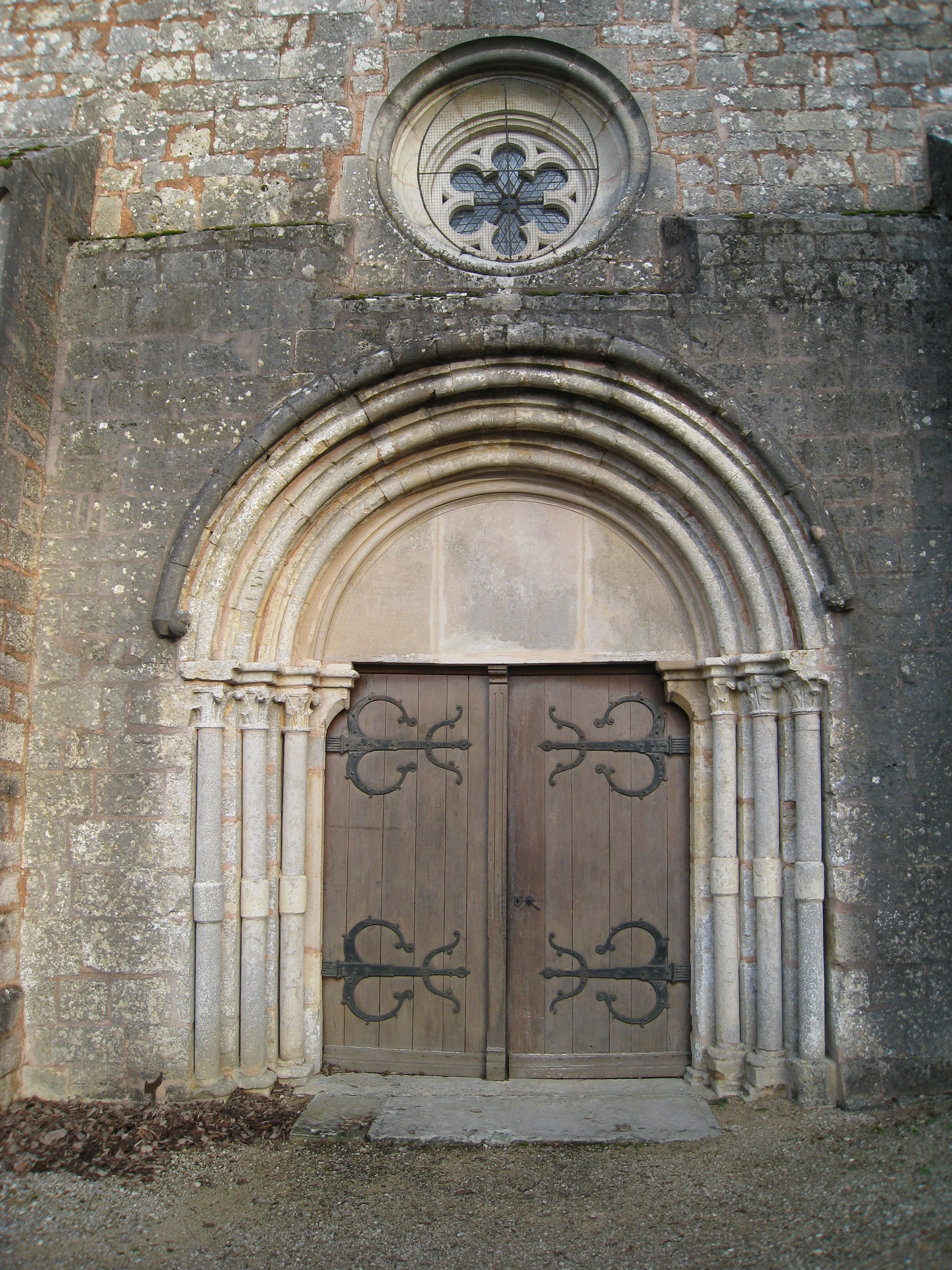 Porte principale de l'église de Montsaugeon